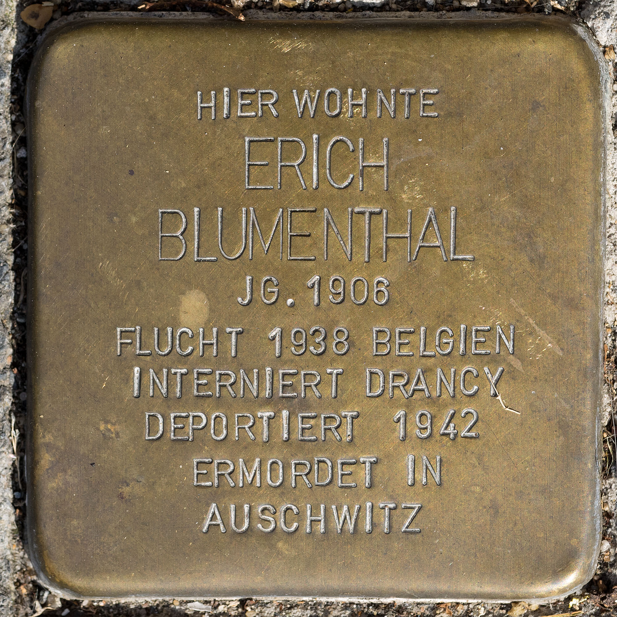 Stolpersteine MG: Blumenthal, Erich